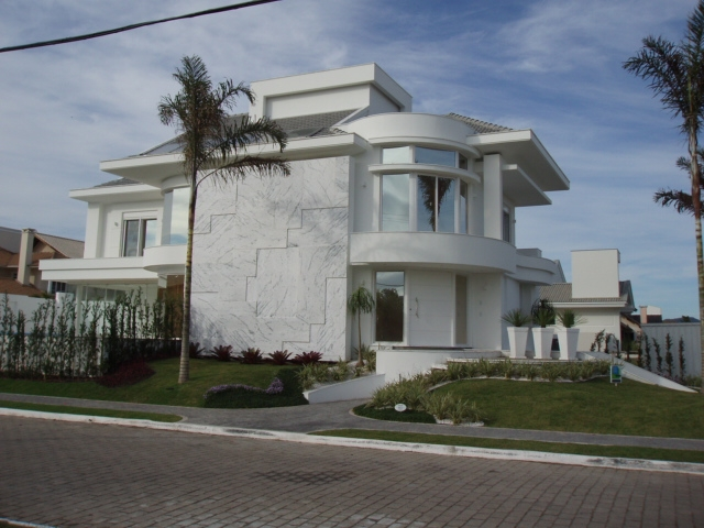 Mansão em Jurerê, bairro de Florianópolis